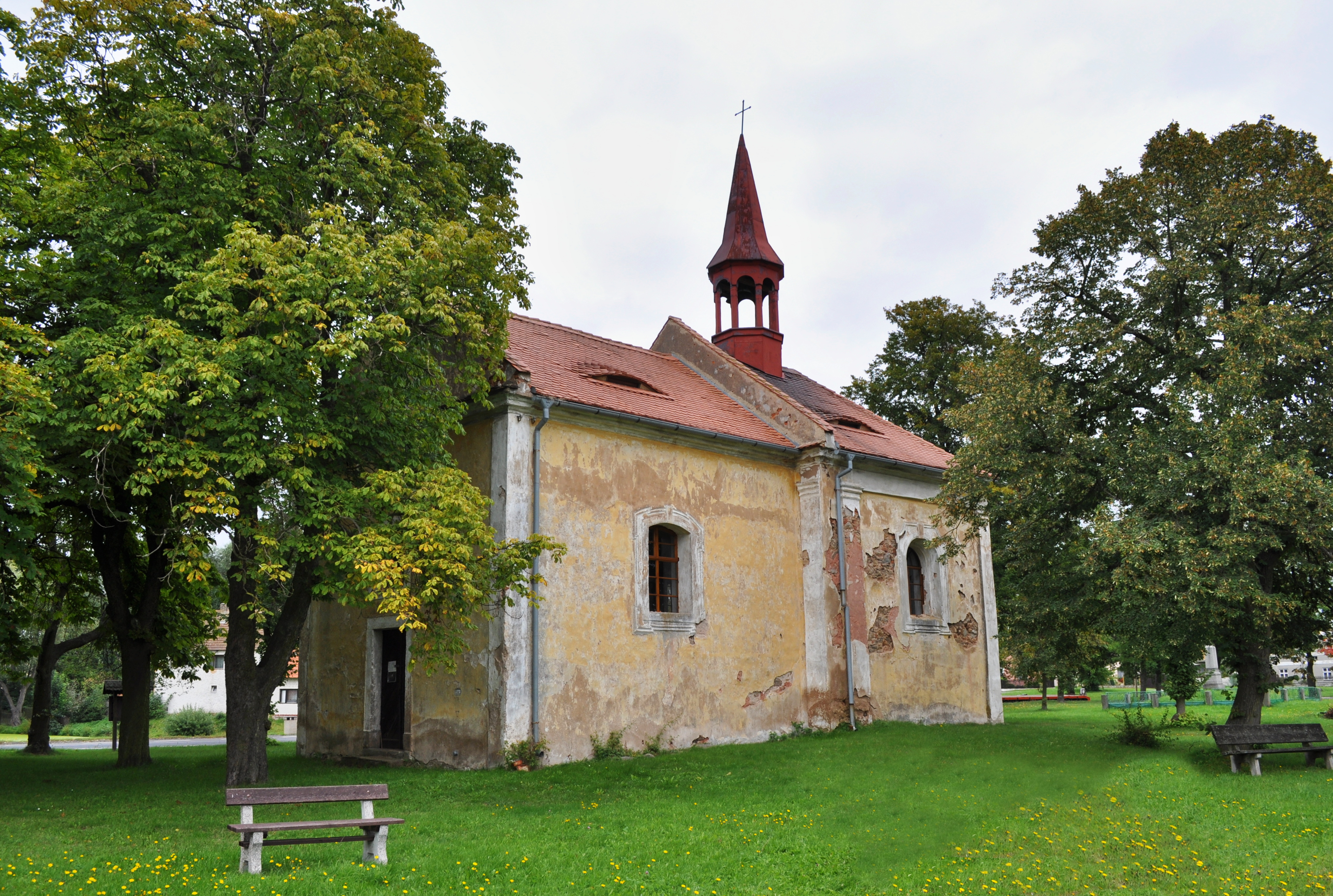 Kaple sv. Martina, Žďár, okres Rakovník.